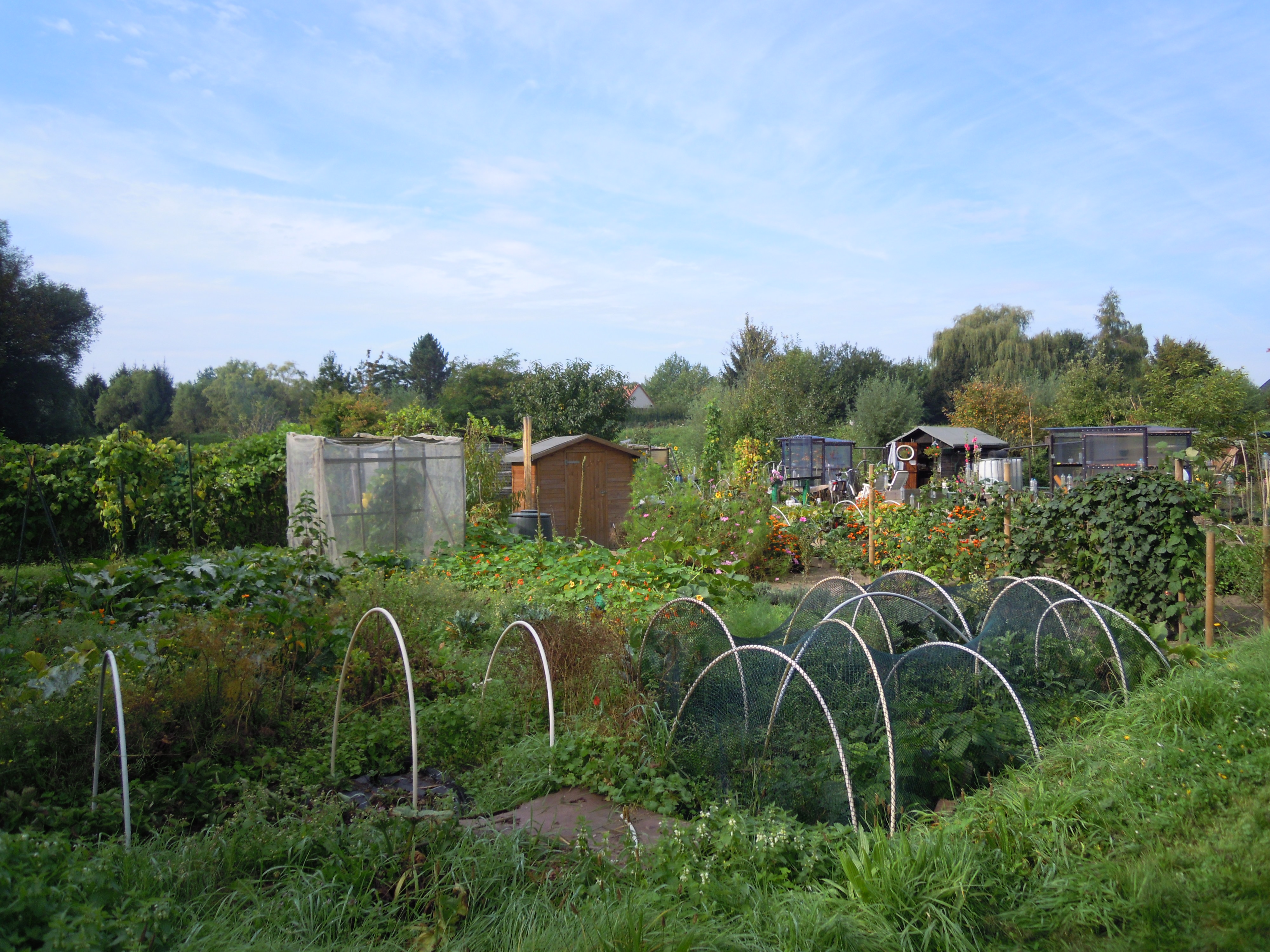 Volkstuintjes Lier